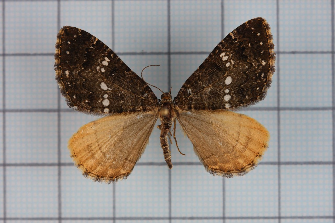 Trichoplites albimaculosa Inoue, 1978 珠脊尺蛾 鞍1:P.55,Pl.12-33